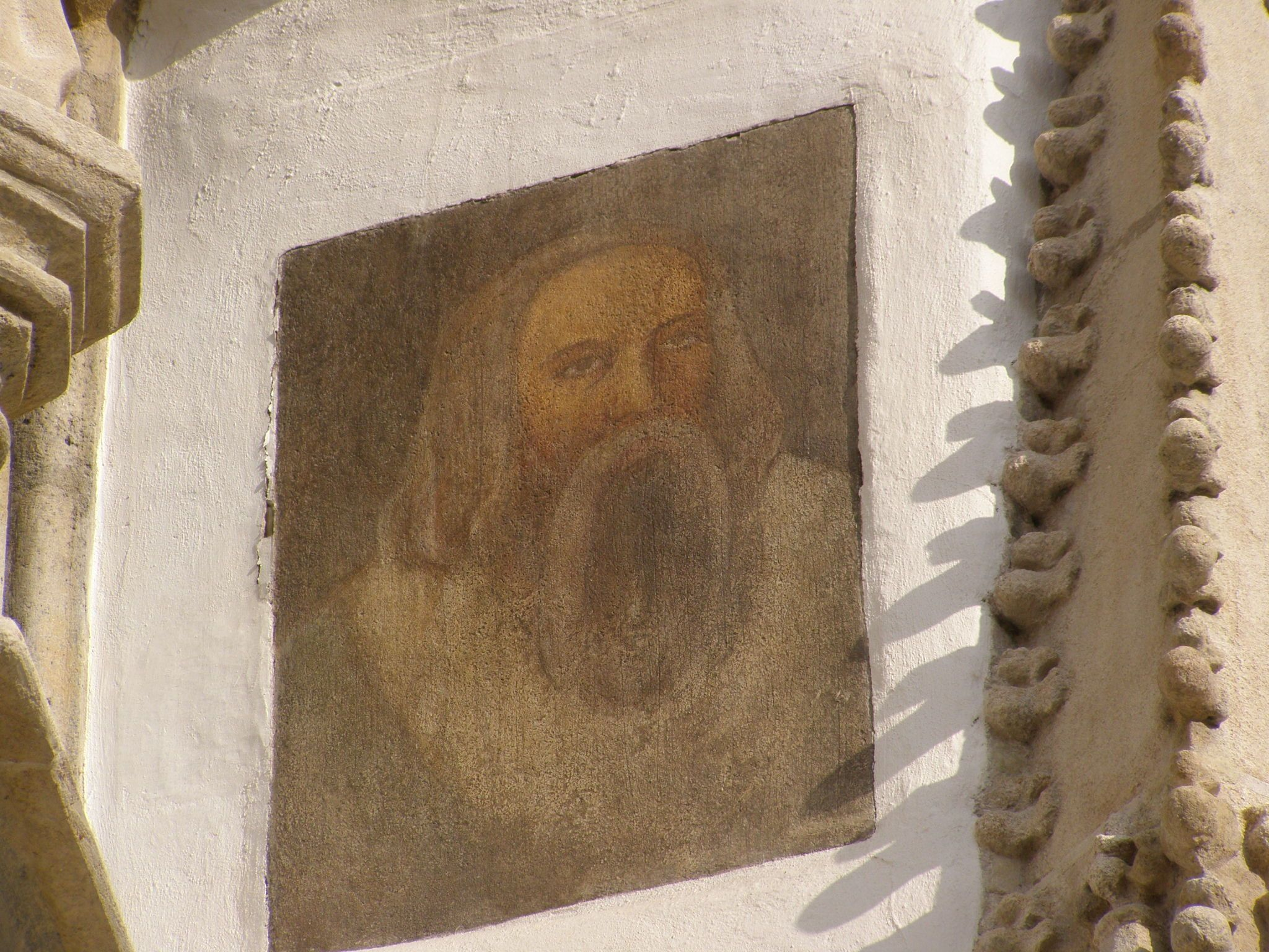 Údajná podobizeň prvého bratislavského richtára Jakuba na západnej fasáde radnice